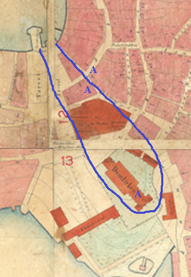 Bybrannen i Stavanger i 1271 eller 1272 hadde så langt vi vet i dag, omfanget som vist med blå strek. A-ene innenfor den blå streken viser til kjente brannsteder. A-en utenfor viser til en brann på slutten av 1400-tallet.